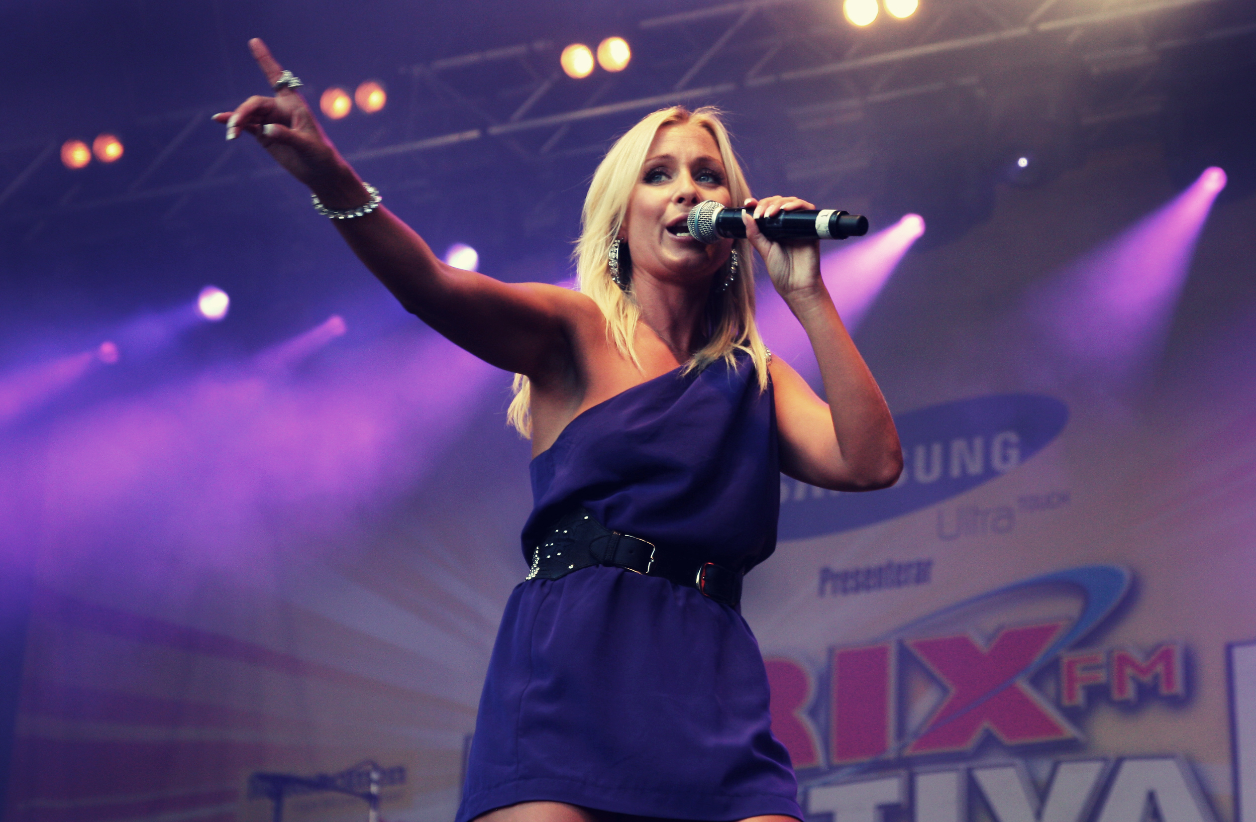 Rix FM Festival 2009, Kalmar, Sweden.